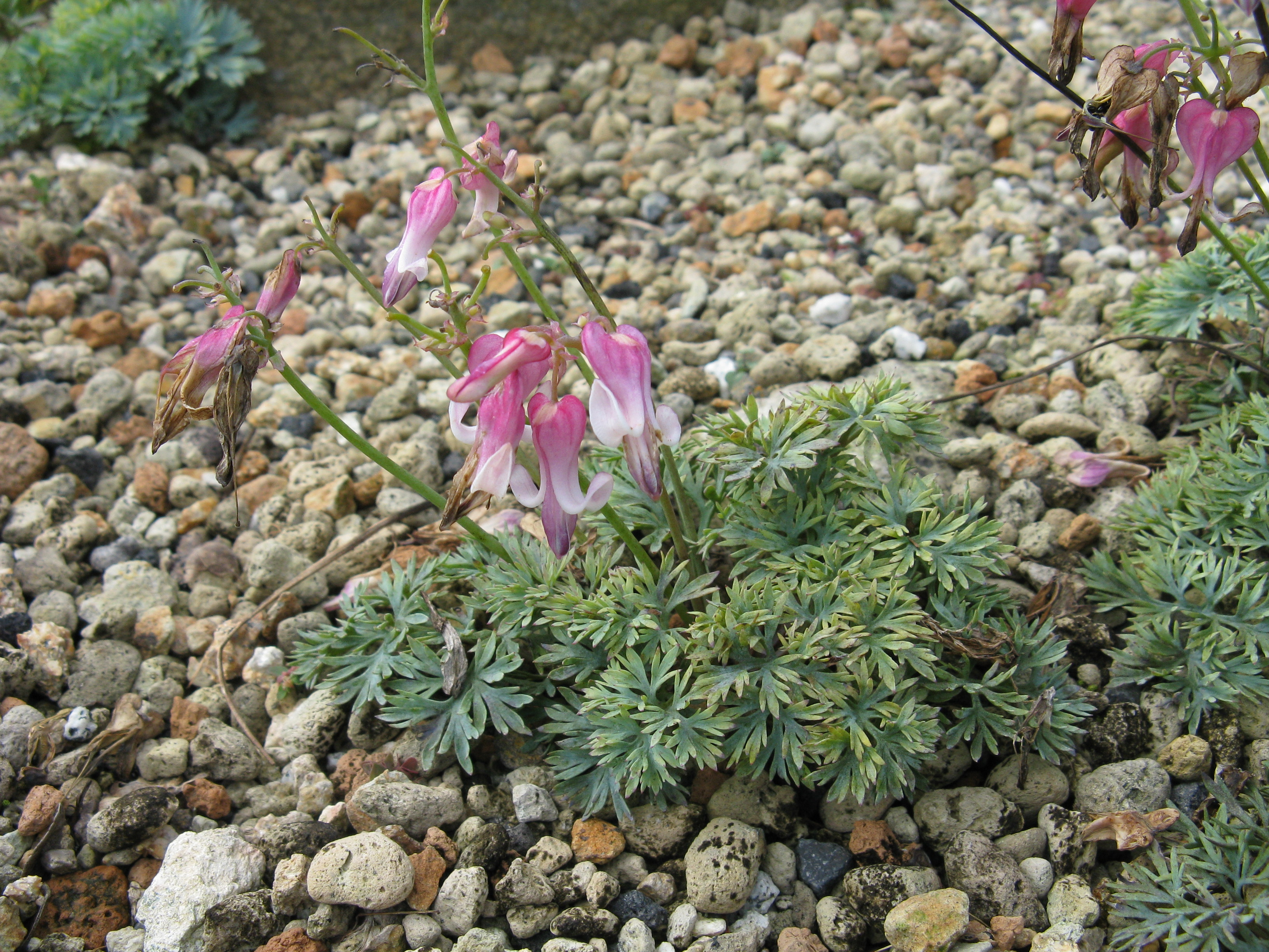 Scientific name Dicentra peregrina